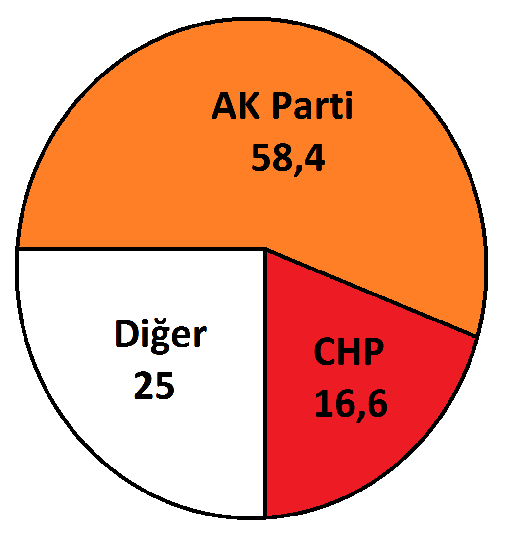 Malatya'da Haziran 2015 Türkiye Genel Seçimleri